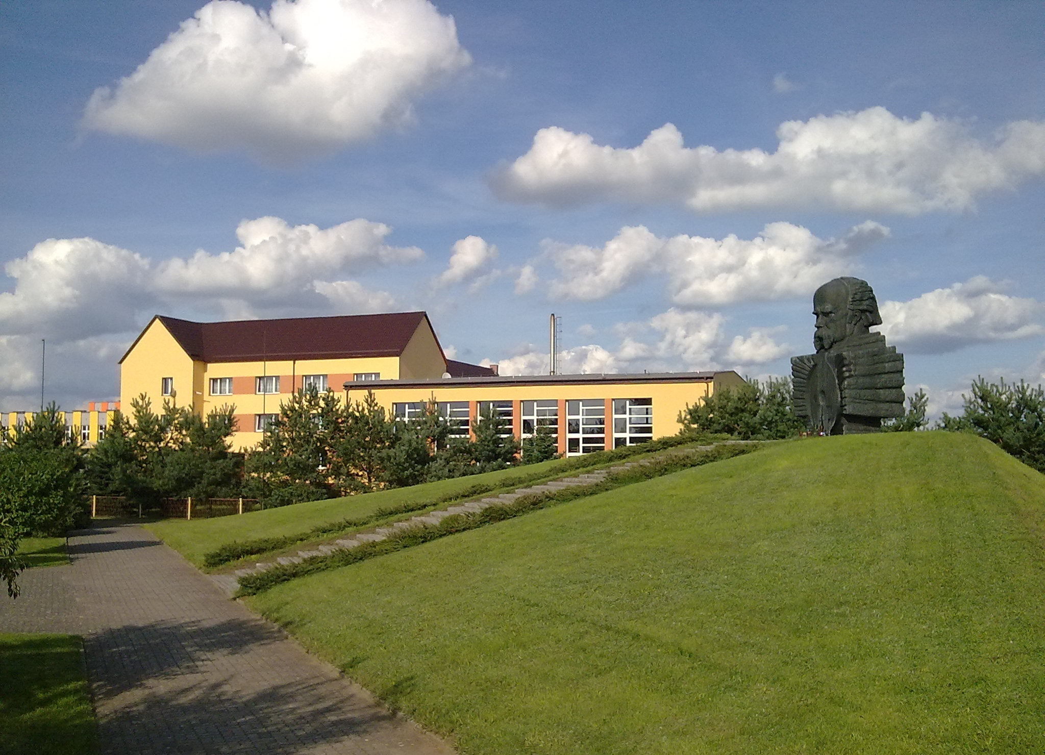 Zespół Szkół Ogólnokształcących im. Tarasa Szewczenki w Białym Borze oraz pomnk Tarasa Szewczenki